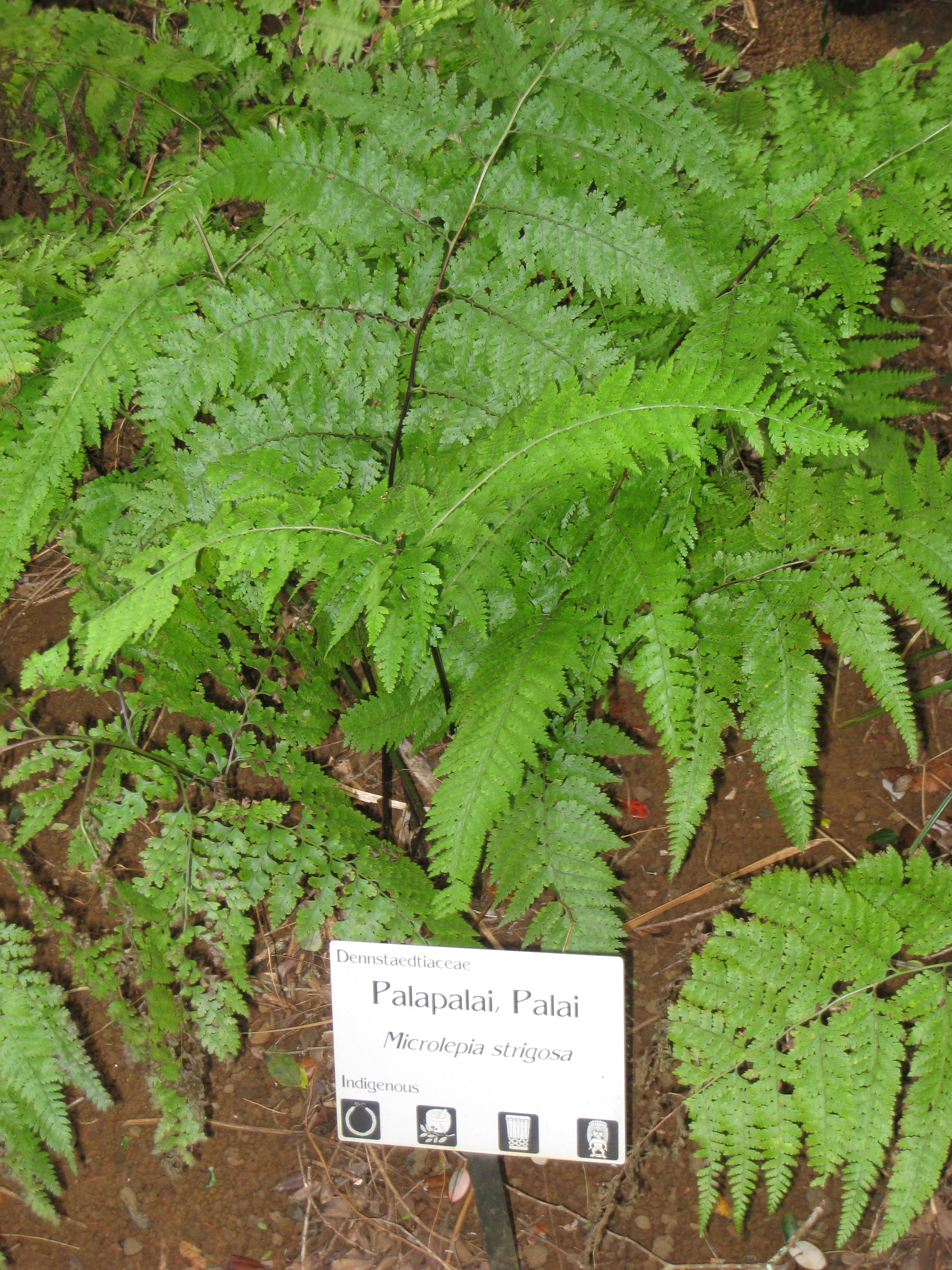 Microlepia strigosa in Lyon Arboretum, Hawaii, USA.